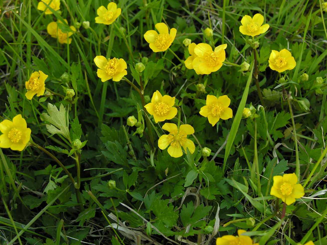 Šliaužiantysis vėdrynas (Ranunculus repens) Šeima. Vėdryniniai (Ranunculaceae) Foto: Algirdas, 2006 m. birželio 3 d., Lietuva